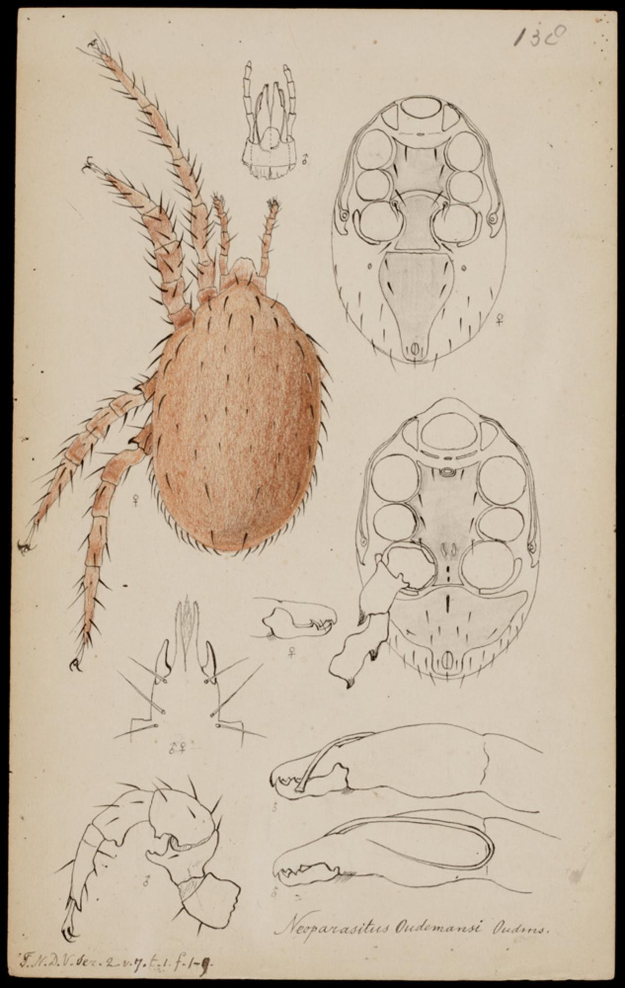 Neoparasitus oudemansi (Oudemans)"F.N.D.V." ser. 2 vol. 7 tome 1 fol 1-9 (=TDNV, Tijdschrift der Nederlandsche Dierkundige Vereeniging?)